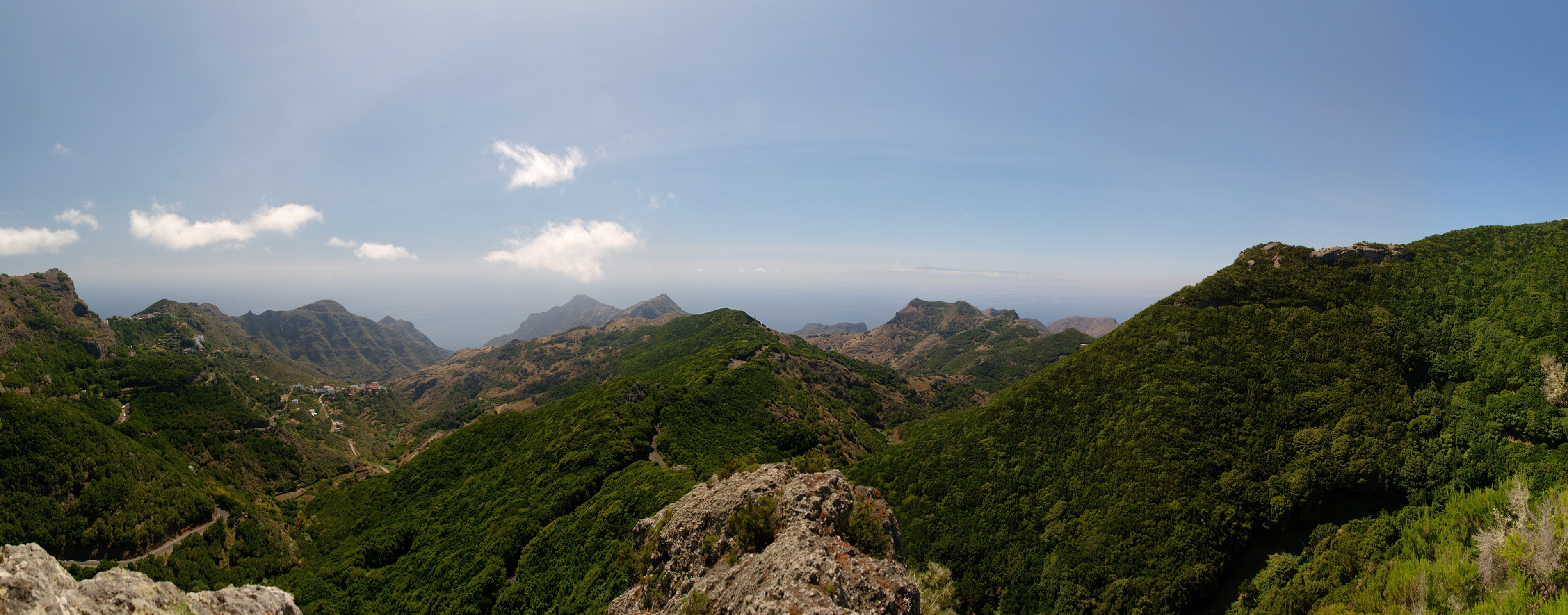 Anosma e Ijuana